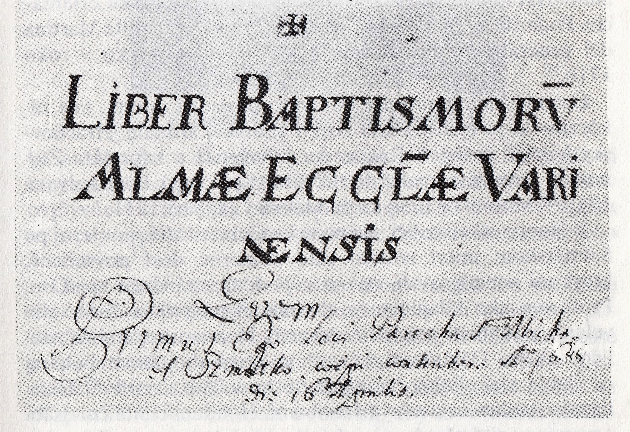 Faksimile farskej matriky vo Varíne do ktorej bol pri krste zapísaný slovenský národný hrdina, zbojník Juraj Jánošík v roku 1688.